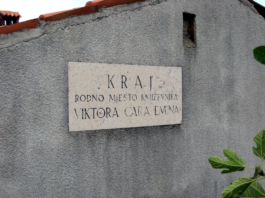 Spomen ploča Viktoru Caru Eminu u Donjem Kraju